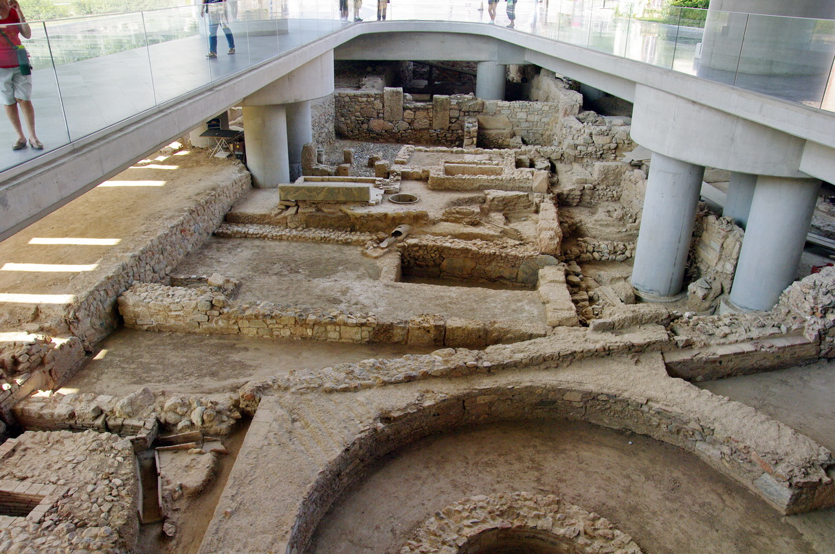 Ausgrabungen unter Eingang Akropolis-Museum